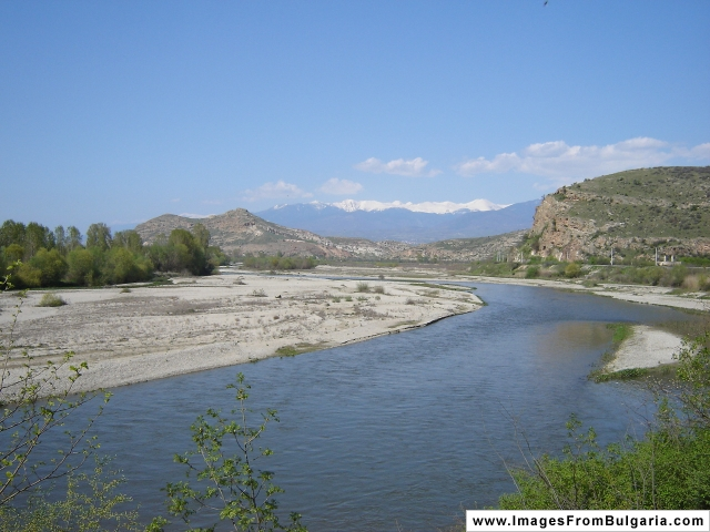 Река Струма, преминаваща през угасналия вулкан Кожух. Struma river, ripping through the extinct volcano Kozhuh.